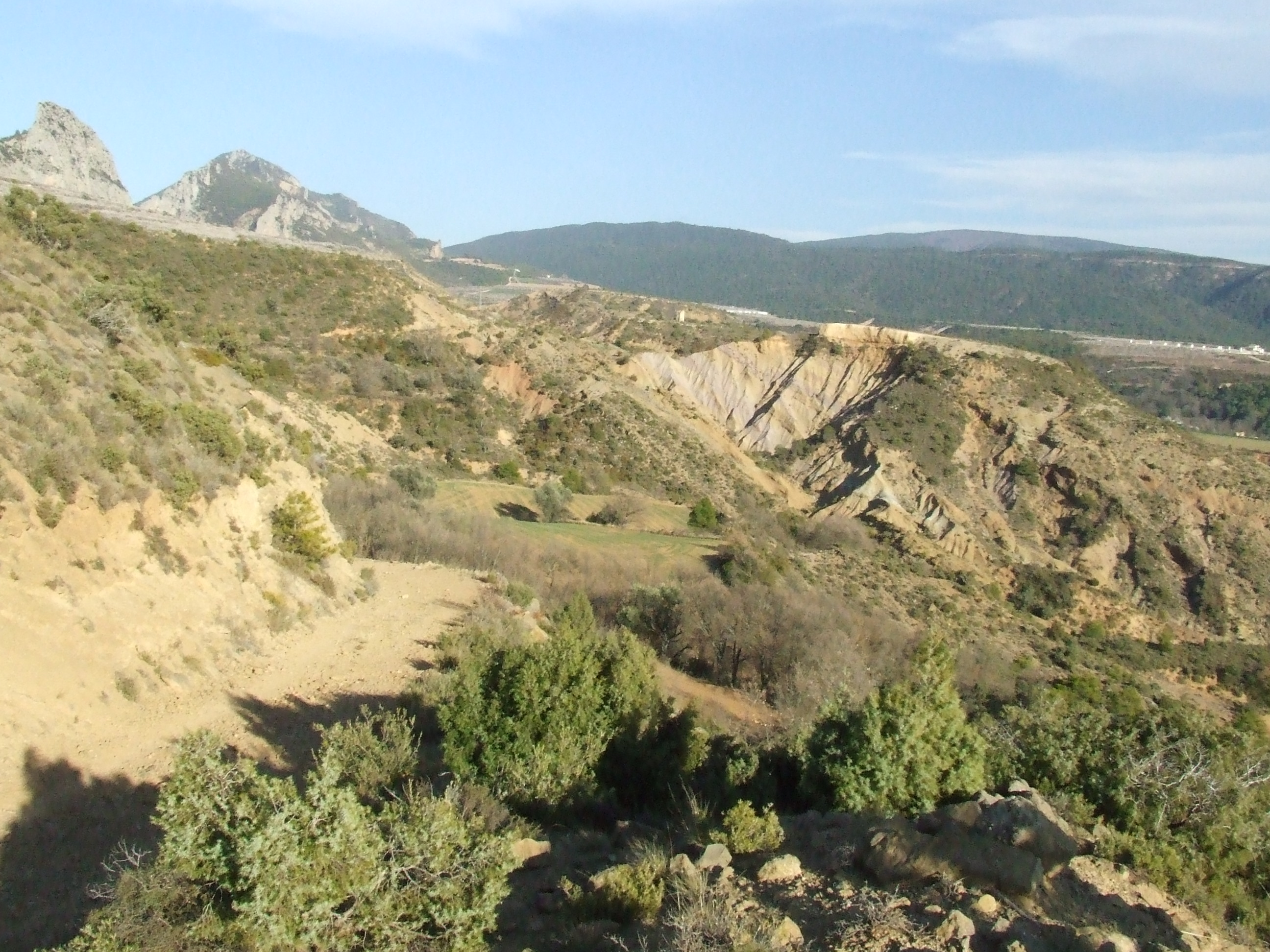 Les Grives (Abella de la Conca., Pallars Jussà)